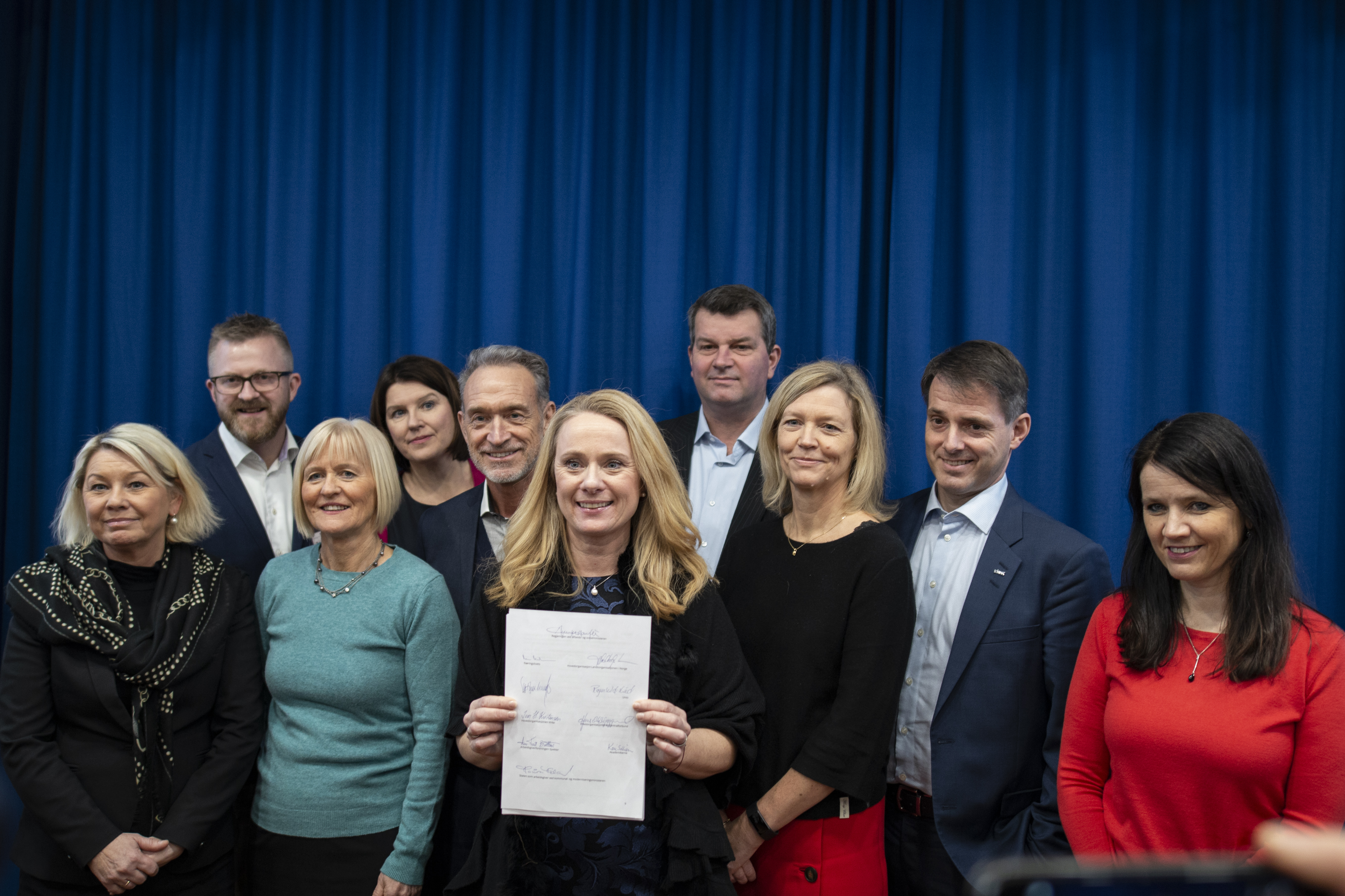 Partene i arbeidslivet signerte ny IA-avtale for 2019–2022. Arbeids- og sosialministeren holder IA-avtalen – et arbeidsliv med plass til alle, sammen med alle partene i arbeidslivet. Fra venstre: Kommunal- og moderniseringsminister Monica Mæland, Hans-Erik Skjæggerud (YS) , Ragnhild Lied (Unio), Kari Sollien (Akademikerne), Tor Arne Gangsø (KS), Arbeids- og sosialminister Anniken Hauglie, Hans Christian Gabrielsen (LO), Nina Melsom (NHO), Ivar Horneland Kristensen (Virke), Anne-Kari Bratten (Spekter). Foto: Jan Richard Kjelstrup/ASD.